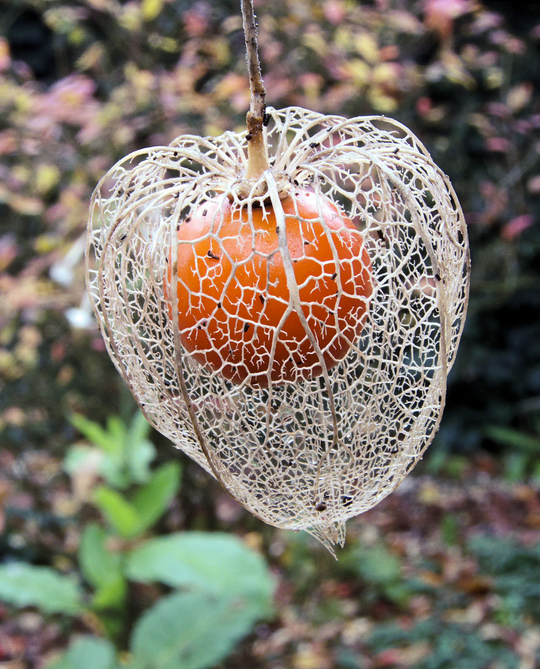 Physalis alkekengi (Echte lampionplant), vrucht met nervatuur kelkblad